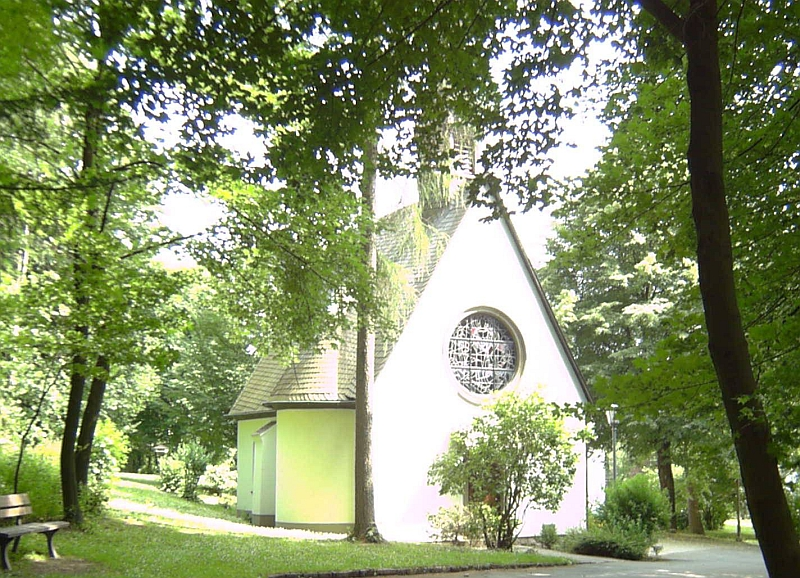 Hoher Knochen Kapelle (Berg und Ortsteil in Schmallenberg), Germany.